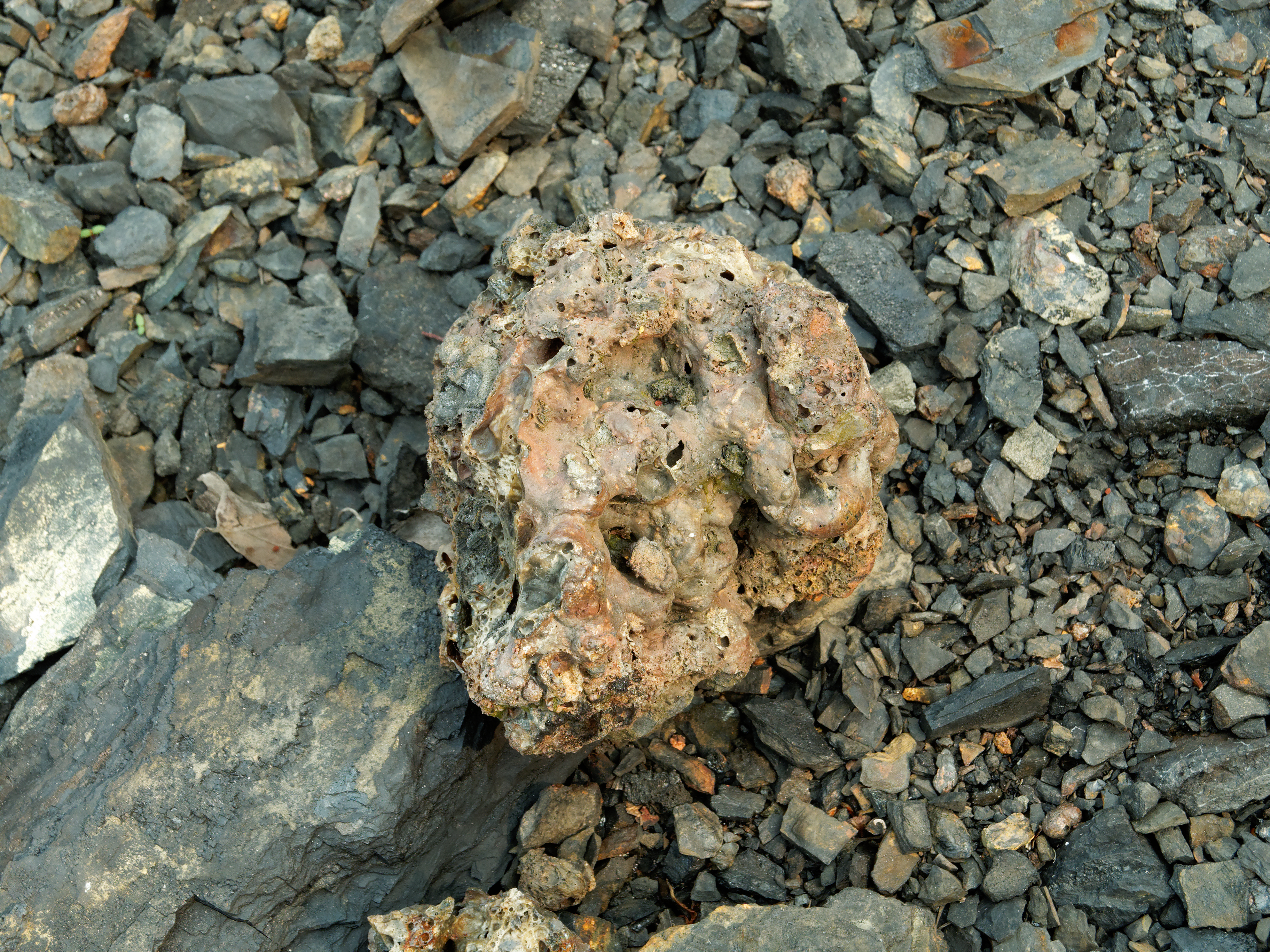 Détail d'un élément composant un terril à Ronchamp.